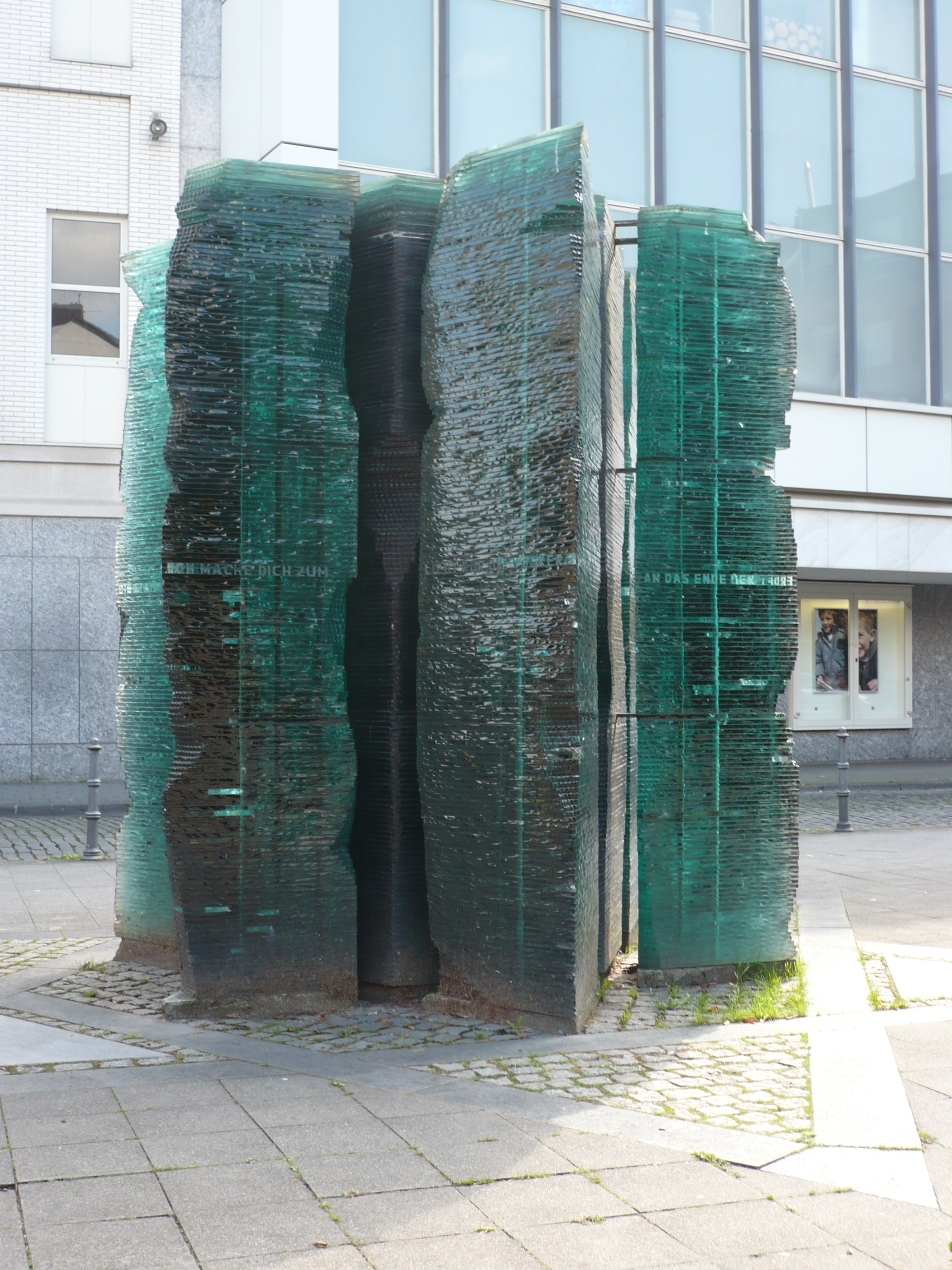 Das in Erinnerung an die Pogrome vom 8./9. November 1938 "Kristallnacht" genannte Mahnmal von Heinz Tobolla wurde am 8. November 1984 auf dem Synagogenplatz in Aachen enthüllt. Es steht vor der 1995 wieder erbauten heutigen Synagoge. Das Mahnmal trägt die Inschift: "Und der Herr sagte, es ist zu wenig, daß du Israel mein Knecht bist, nur um die Stämme Jakobs wieder aufzurichten. Ich mache dich zum Licht für die Völker, damit mein Heil bis an das Ende der Erde reicht. Jesaja 49,6" Ein Gedenkstein am Fuß des Mahnmal trägt die Inschrift: "Dieses Denkmal errichteten die Evangelische und die Katholische Kirche der Stadt Aachen zur Mahnung gegen jeglichen Haß und jede Feindschaft. 8. November 1984" Eine Stahltafel hinter dem Mahnmal ist beschriftet: "Das Denkmal stellt dar: Die Geschichte Israels als Stern aus David. Trotz vieler Schläge ragt er in seinem Wesen unzerstörbar in die Zukunft. - Die Bürger Aachens erinnern sich an diesem Platz an die Synagoge, die am 19. September 1862 ihrer heiligen Bestimmung übergeben wurde, von den Nazis am 8. November 1938 geschändet und zerstört."